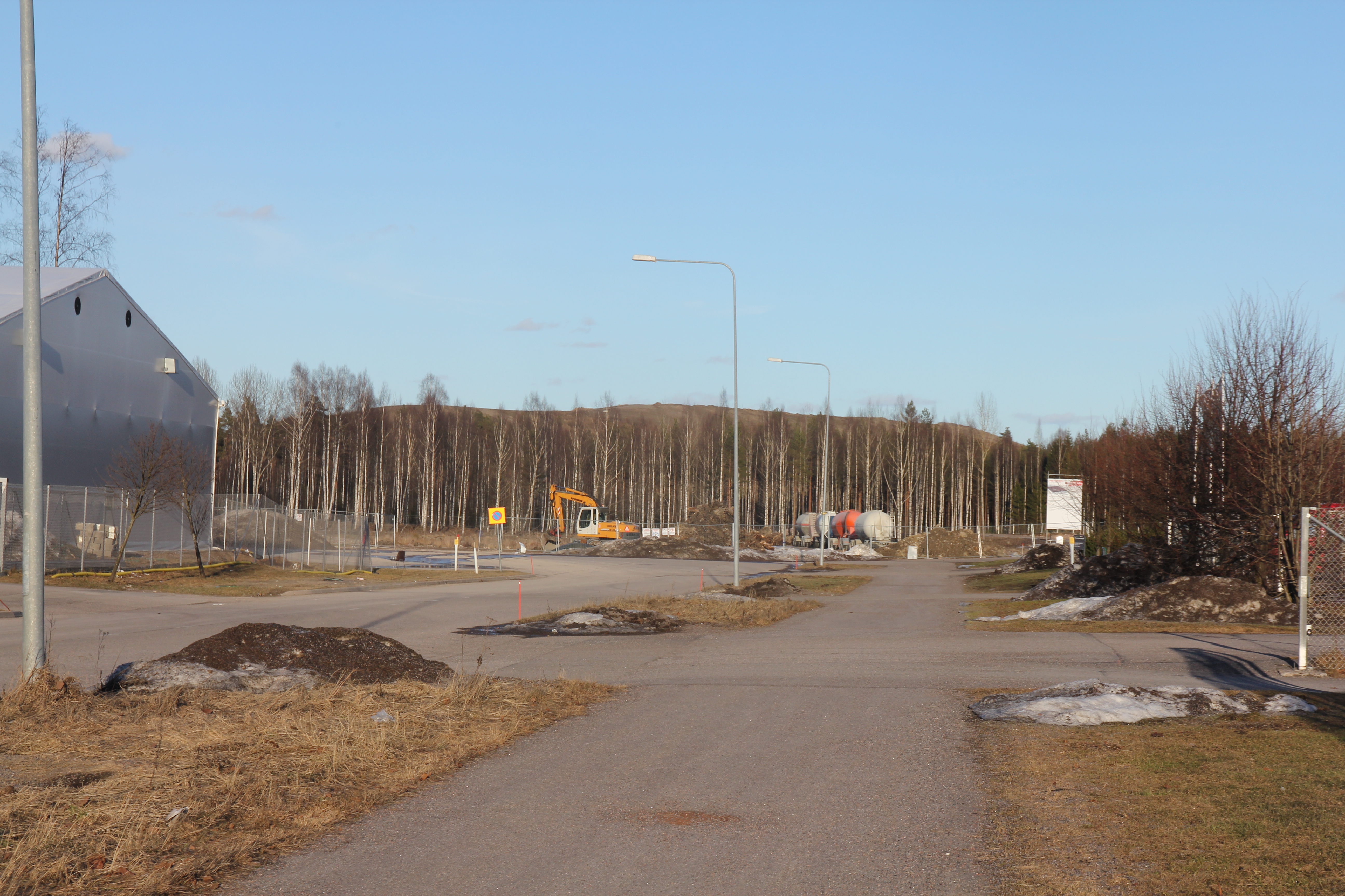 Kulokukkula eli Kulomäen täyttömäki Vantaan Korson kaupunginosassa. Kuva on otettu Tuusulan Maantiekylän Jusslan työpaikka-alueella sijaitsevan Huurrekujan itäpäästä kohti itää.